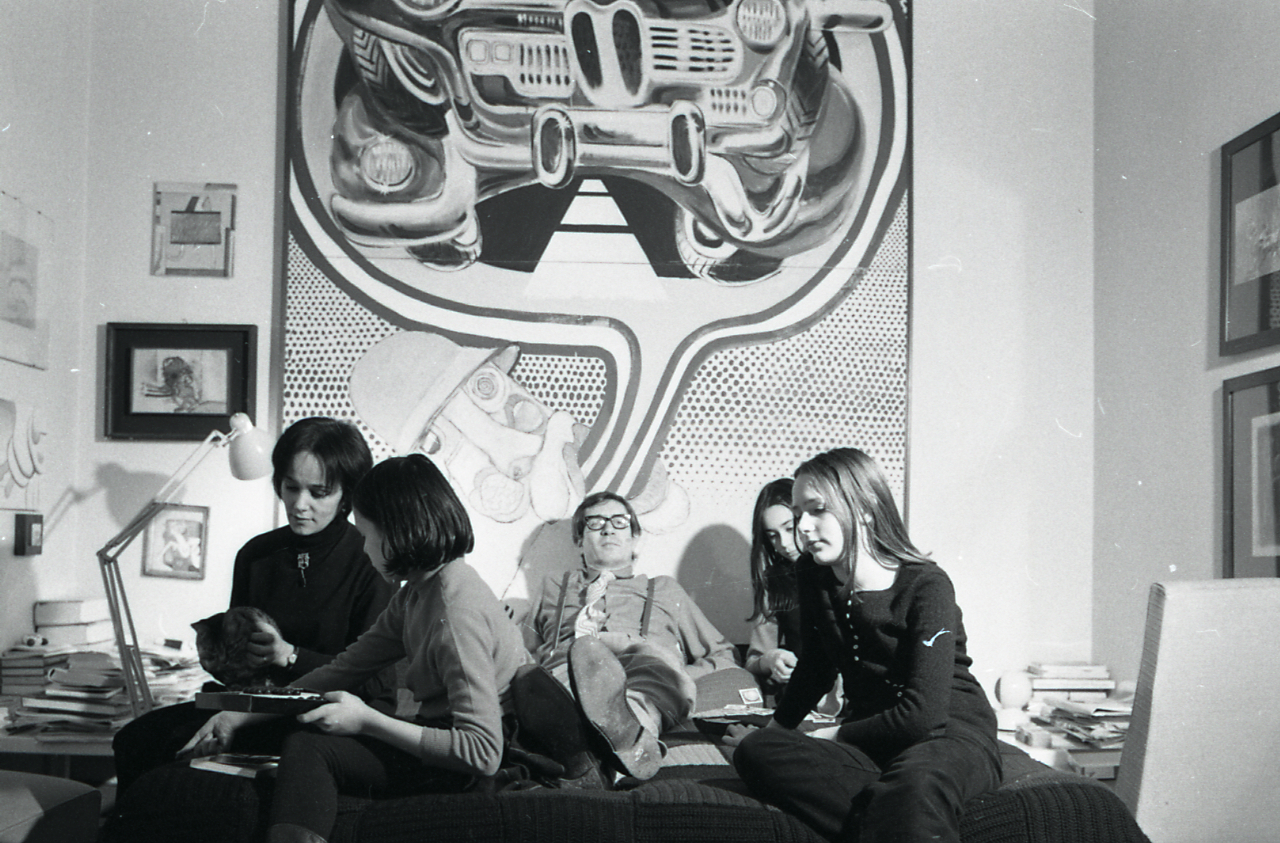 Servizio fotografico : Bologna, 1970 / Paolo Monti. - Strisce: 5, Fotogrammi complessivi: 29 : Negativo b/n, gelatina bromuro d'argento/ pellicola ; 35 mm. - ((I fotogrammi hanno una doppia numerazione. . - Sul portanegativi: Nikon tri-X fr. - Nell'agenda di lavoro citata in nota Monti specifica che le foto sono state scattate presso lo studio dell'artista, sito in Via Saragozza n°83 a Bologna, per il catalogo della mostra. - Occasione: Documentazione di alcune opere dell'artista Pirro Cuniberti per il catalogo di una mostra tenutasi presso la Galleria Foscherari. - Fonte: Fattura di Paolo Monti: IV. Commesse/ Fattura (1970/03/13), presso Archivio Paolo Monti. - Fonte: Agenda di Paolo Monti: Monti/ 3 aprile 1966 - 9 marzo 1971/ 12421-16823 (1966-1971), presso Archivio Paolo Monti